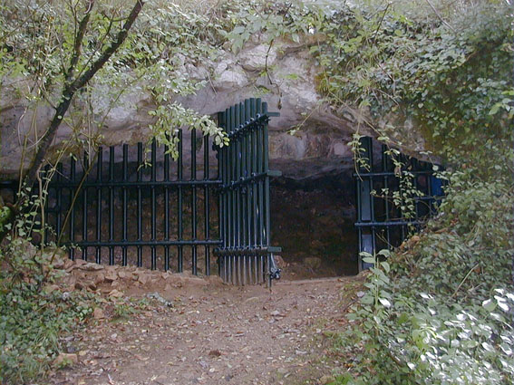 Entrée de la grotte de Cussac